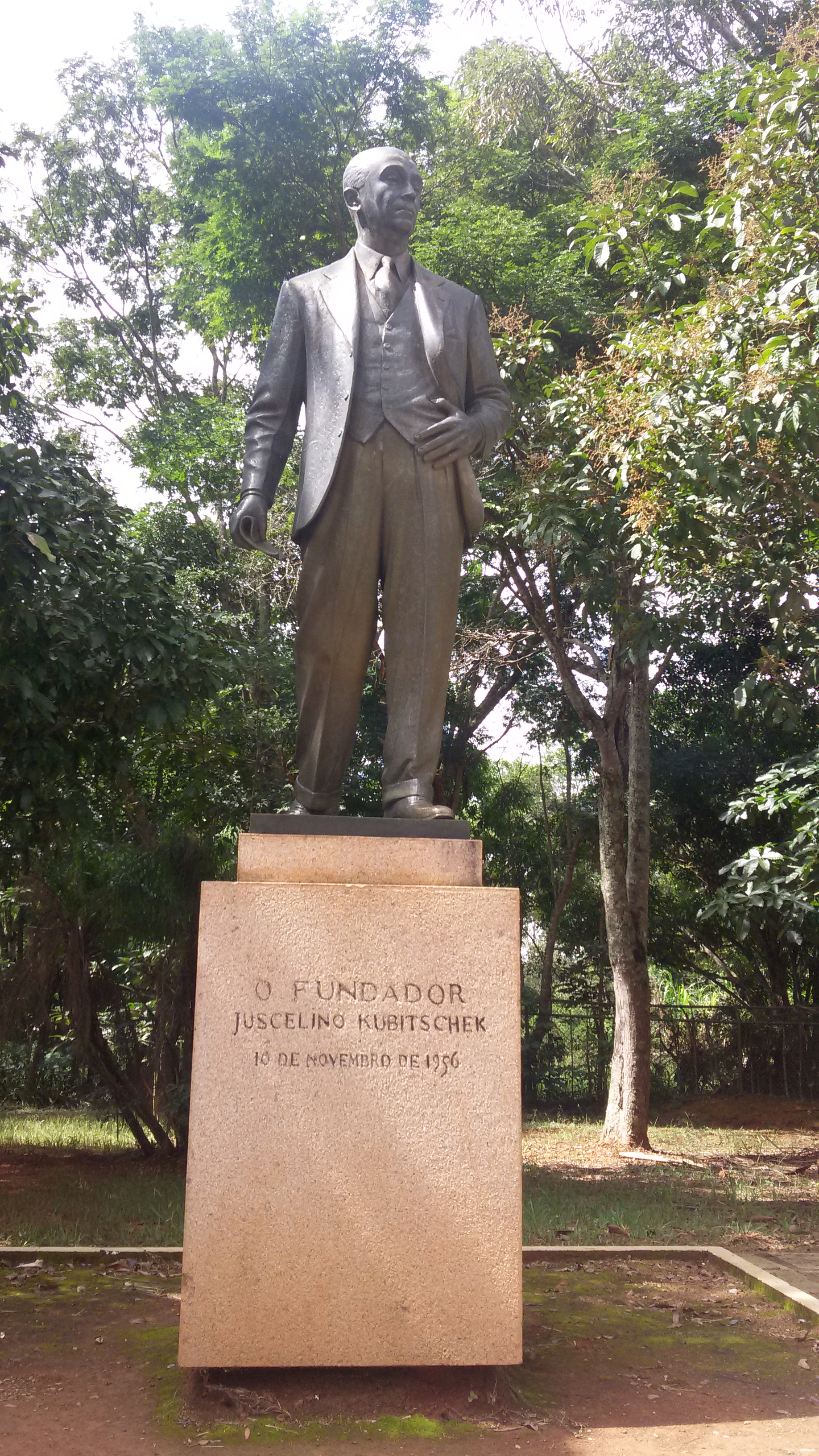 la estatua del Presidente quedase en frente al Palacio de las Tablas.